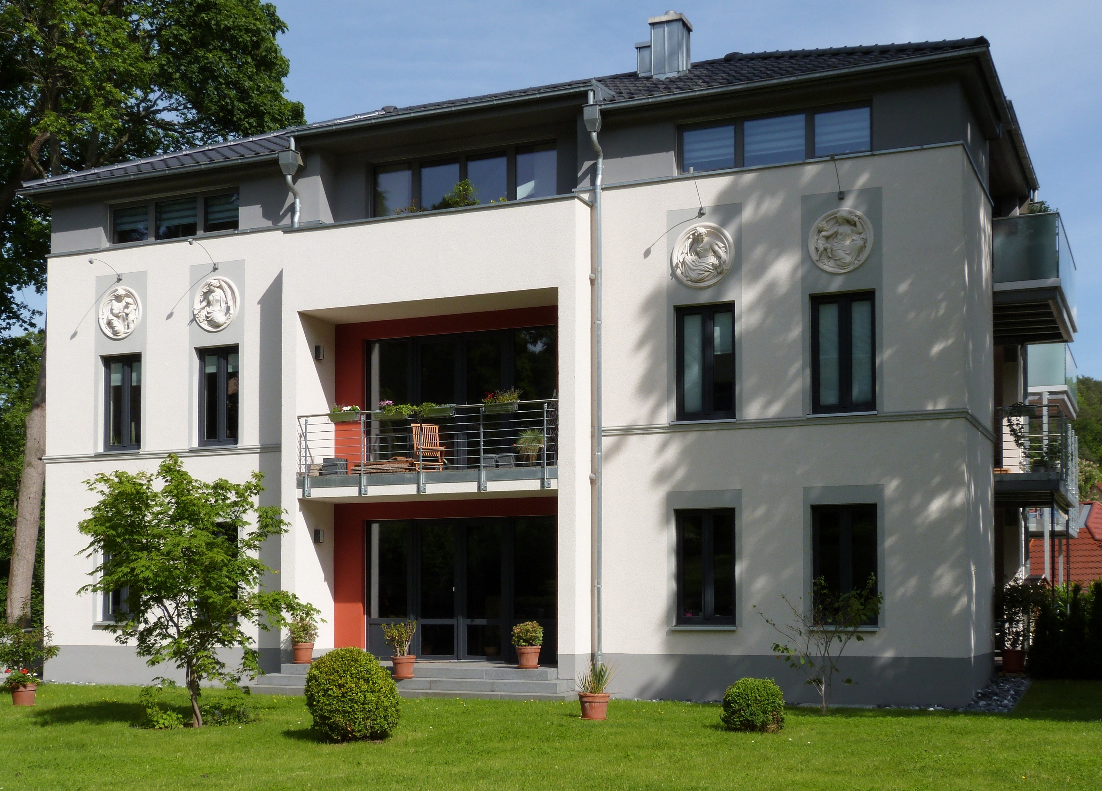 Neubau der Villa Loisset in Eisenach. Zu sehen sind auch die restaurierten Medaillons an der Fassade.